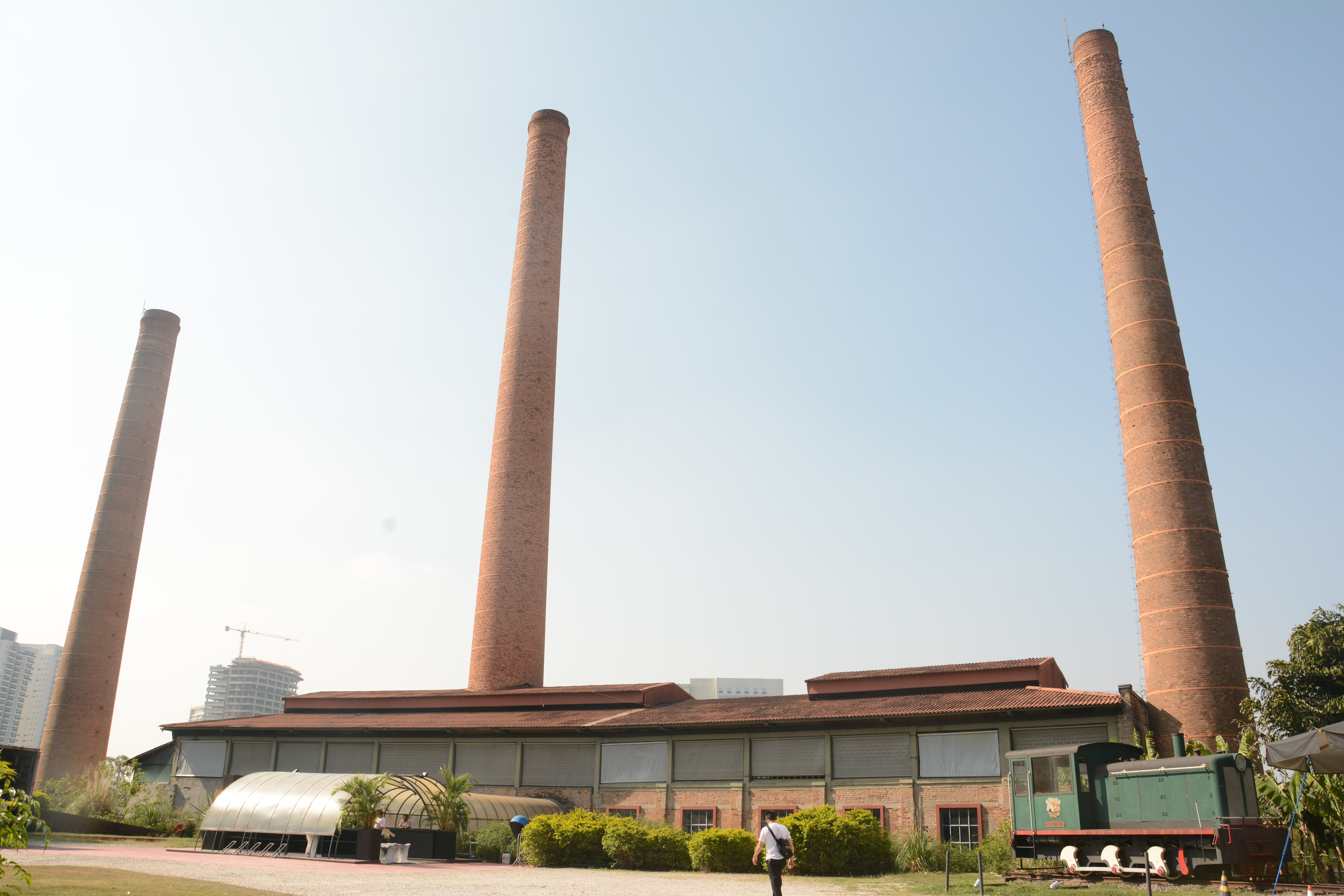 Casa das Caldeiras e chaminés (Barra Funda - São Paulo - SP)